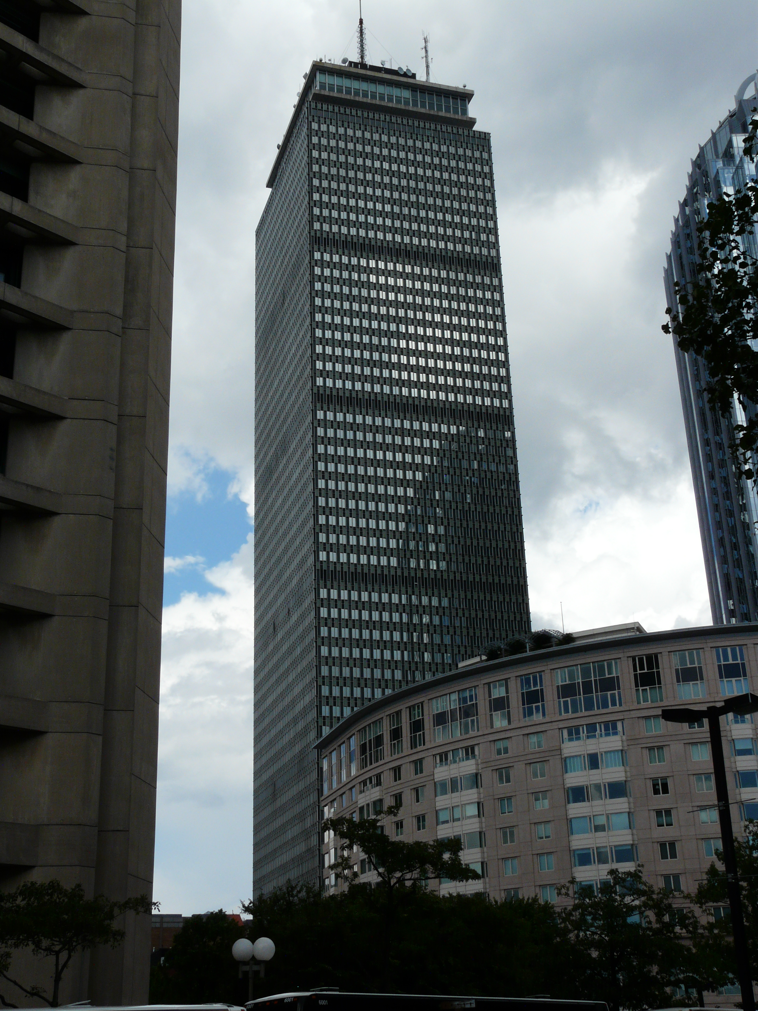 Boston